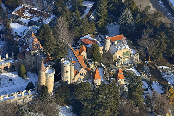 A Bory-vár a levegőből